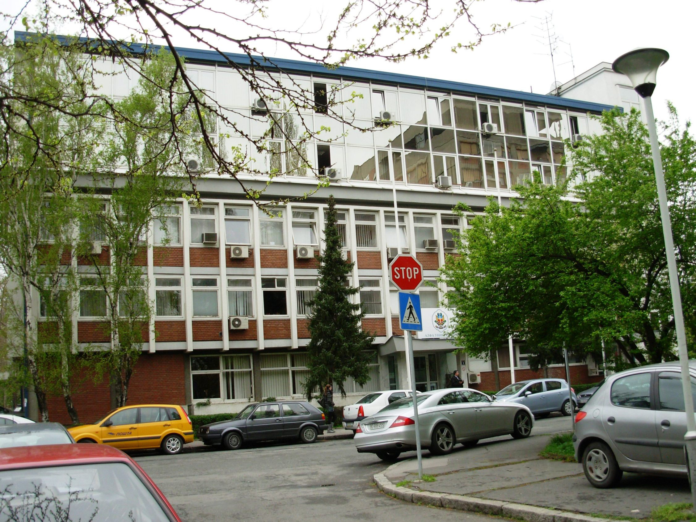 Alfa univerzitet na Novom Beogradu. Slikao Goldfinger